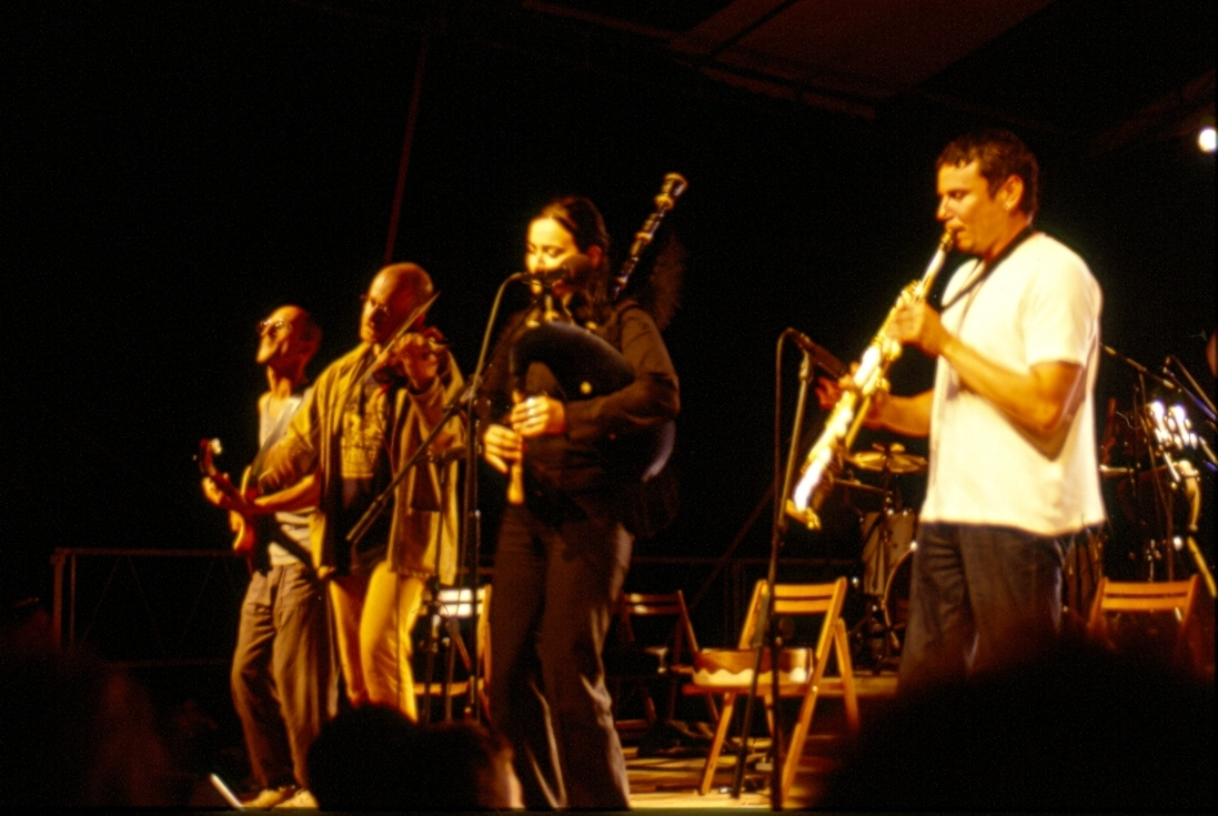 Berrogüetto taldea 2001 urtean.